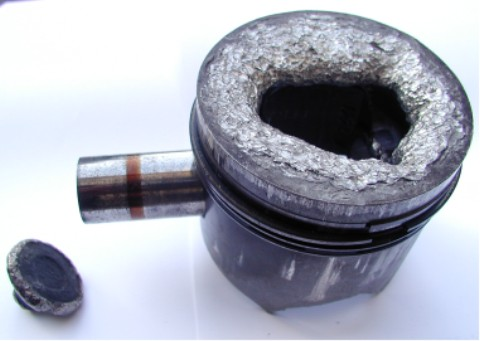 Kolbenfresser Kolbenfresser sichtbar an Seitenwand! Loch am Kolbenboden hat anderen Grund. Überhitzung,Ventil abgerissen und Kolben durchschlagen